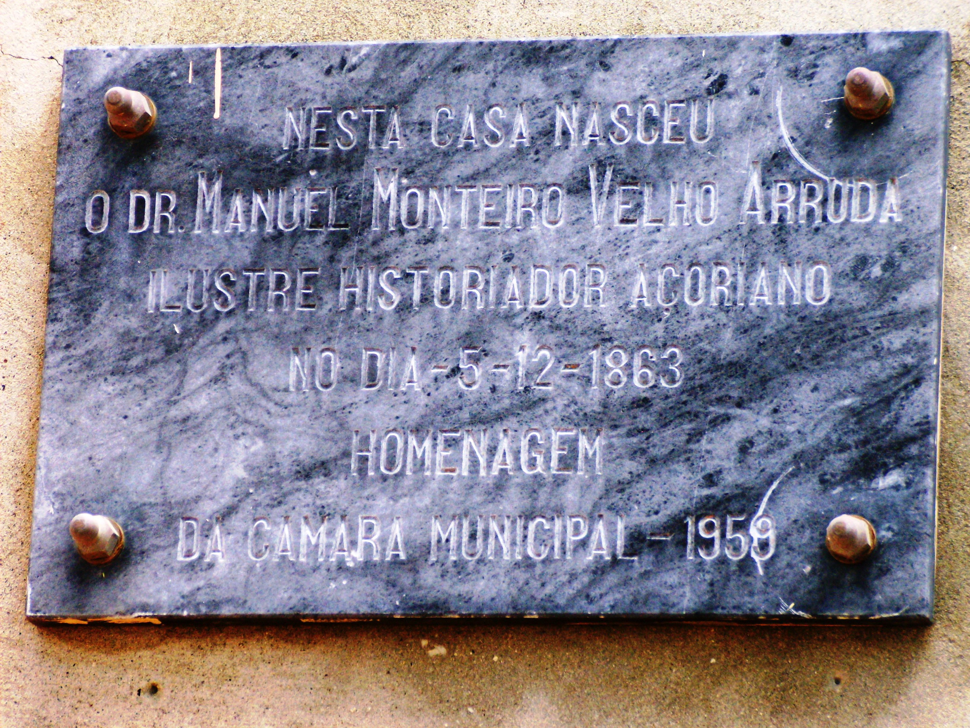 A plaque at the home/birthplace of Dr. Manuel Monteiro Velho Arruda (Azorean historian), civil parish of Vila do Porto, municipality of Vila do Porto (Azores), Portugal